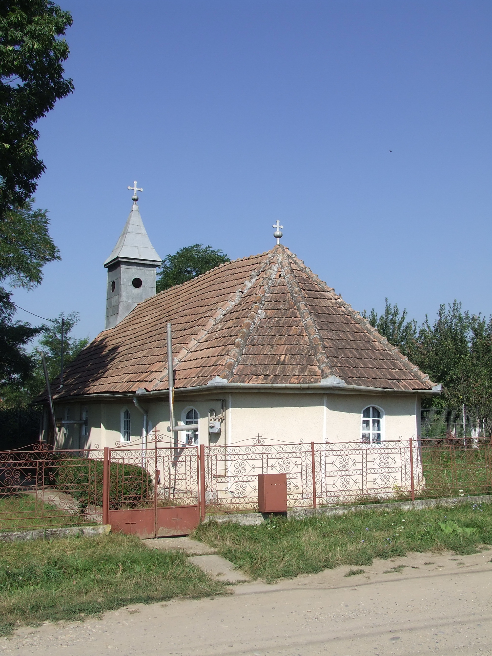 Biserica de lemn din Sfântu Gheorghe, oraşul Iernut, judeţul Mureş.